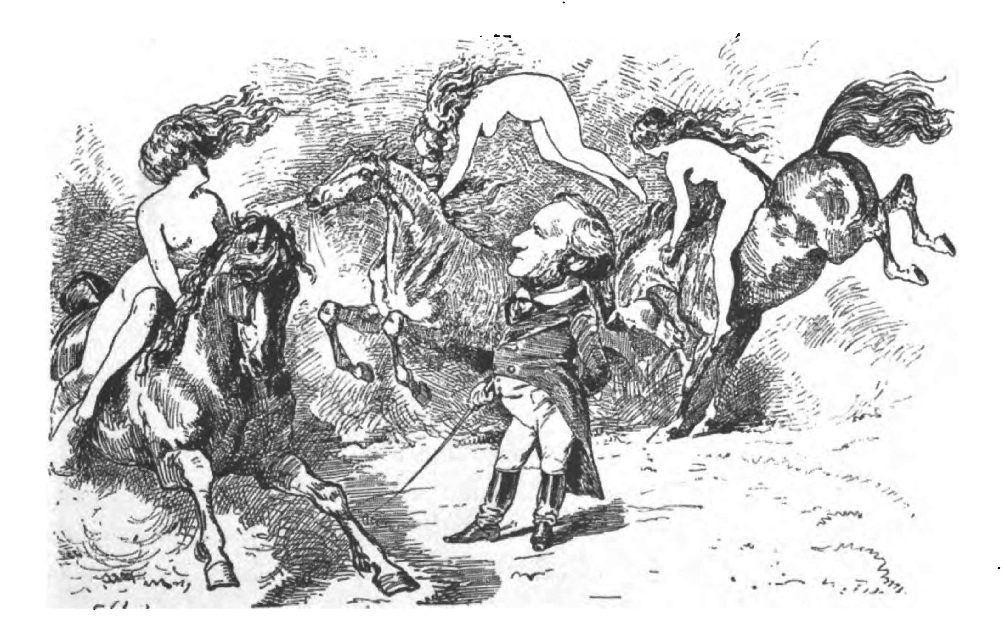 Der Walkürenritt